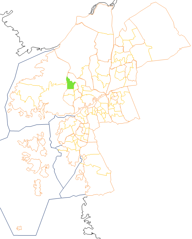 Karta som visar primärområdes belägenhet i Göteborg